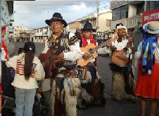 Encuentra todo sobre la historia, tradición de Tabacundo en: Jorge E González M. Los Aruchicos de hace 75 años